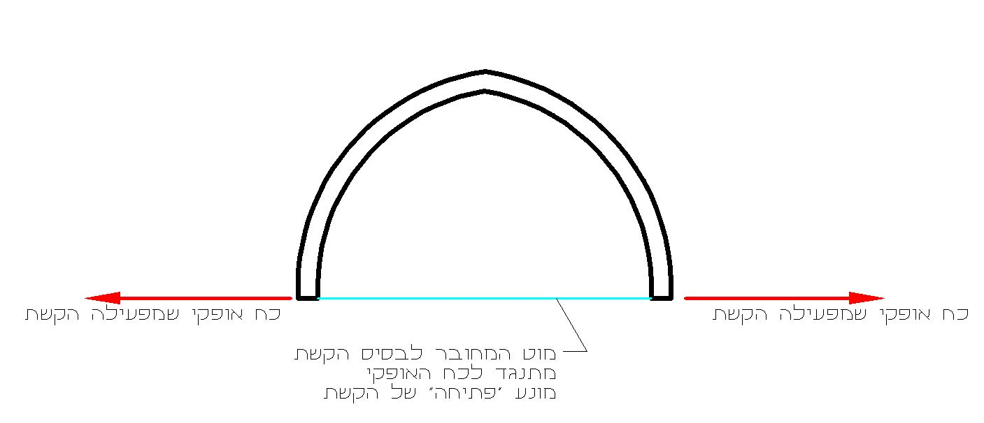 TENSION ROD SKETCH